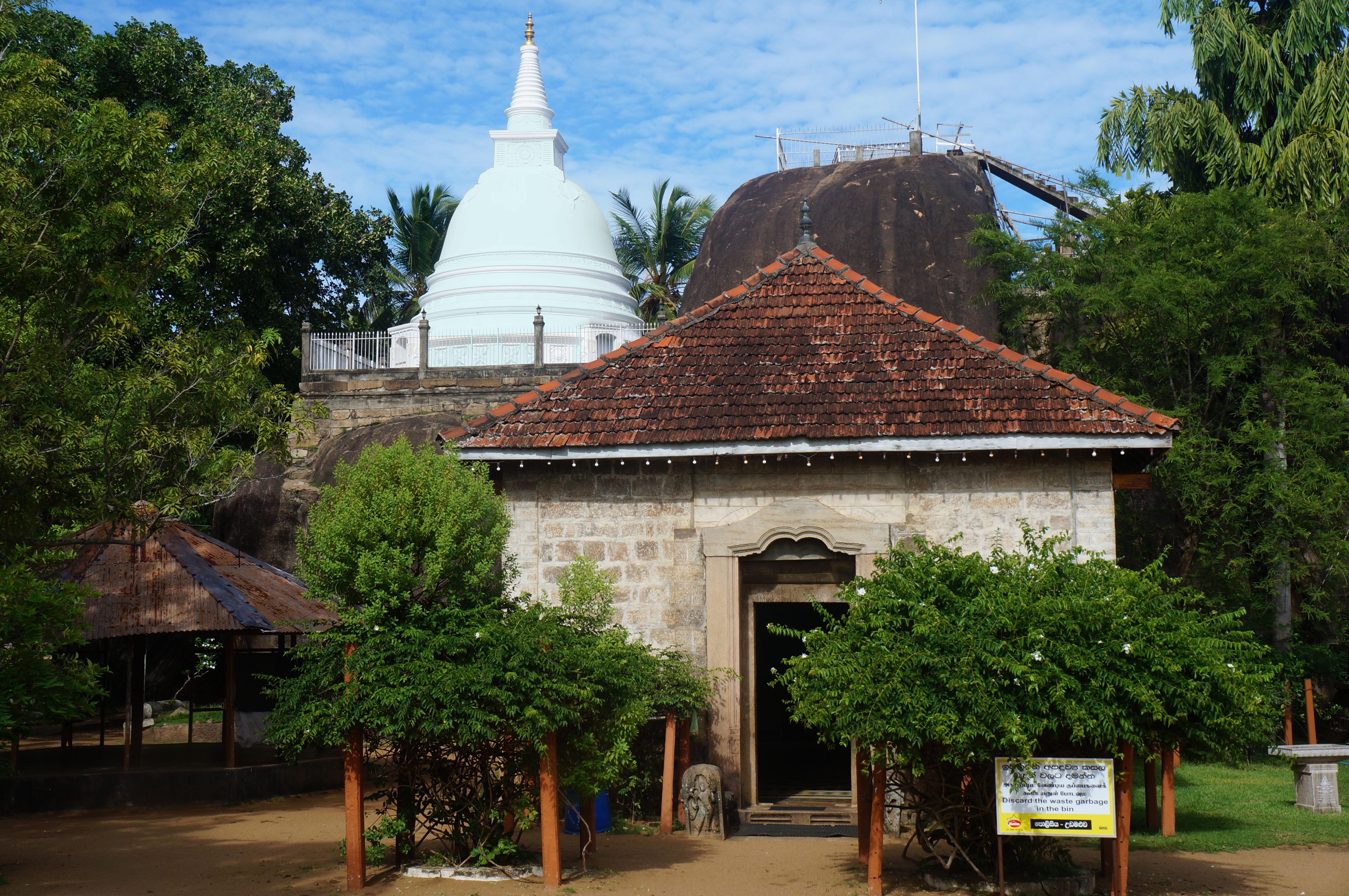 Temple d'Isurumuniya à Anurâdhapura, au Sri Lanka.